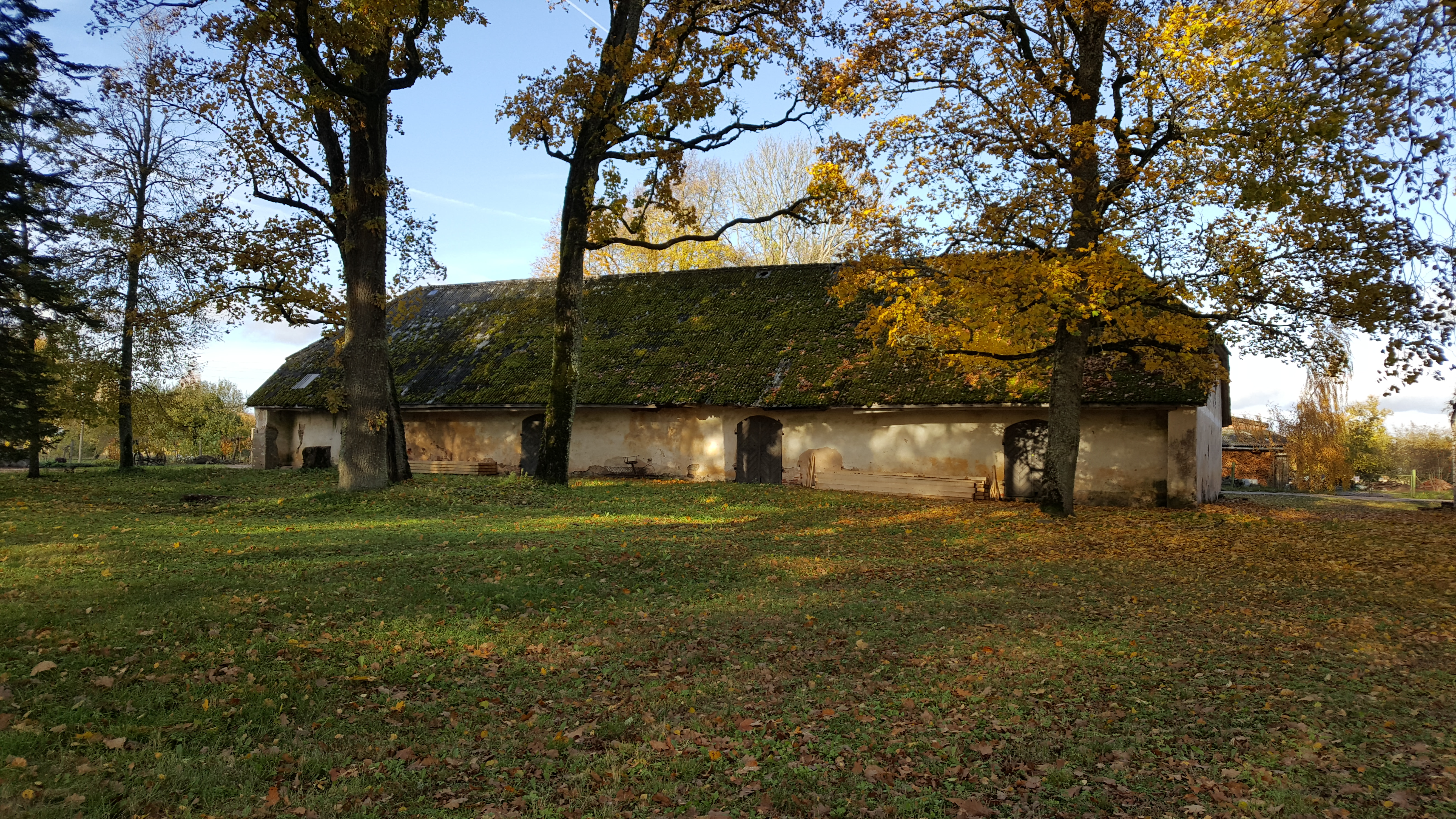 Liepa mõisa ait 2017. aastal.